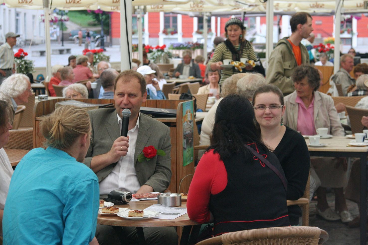 Tartu linna päev 2013.